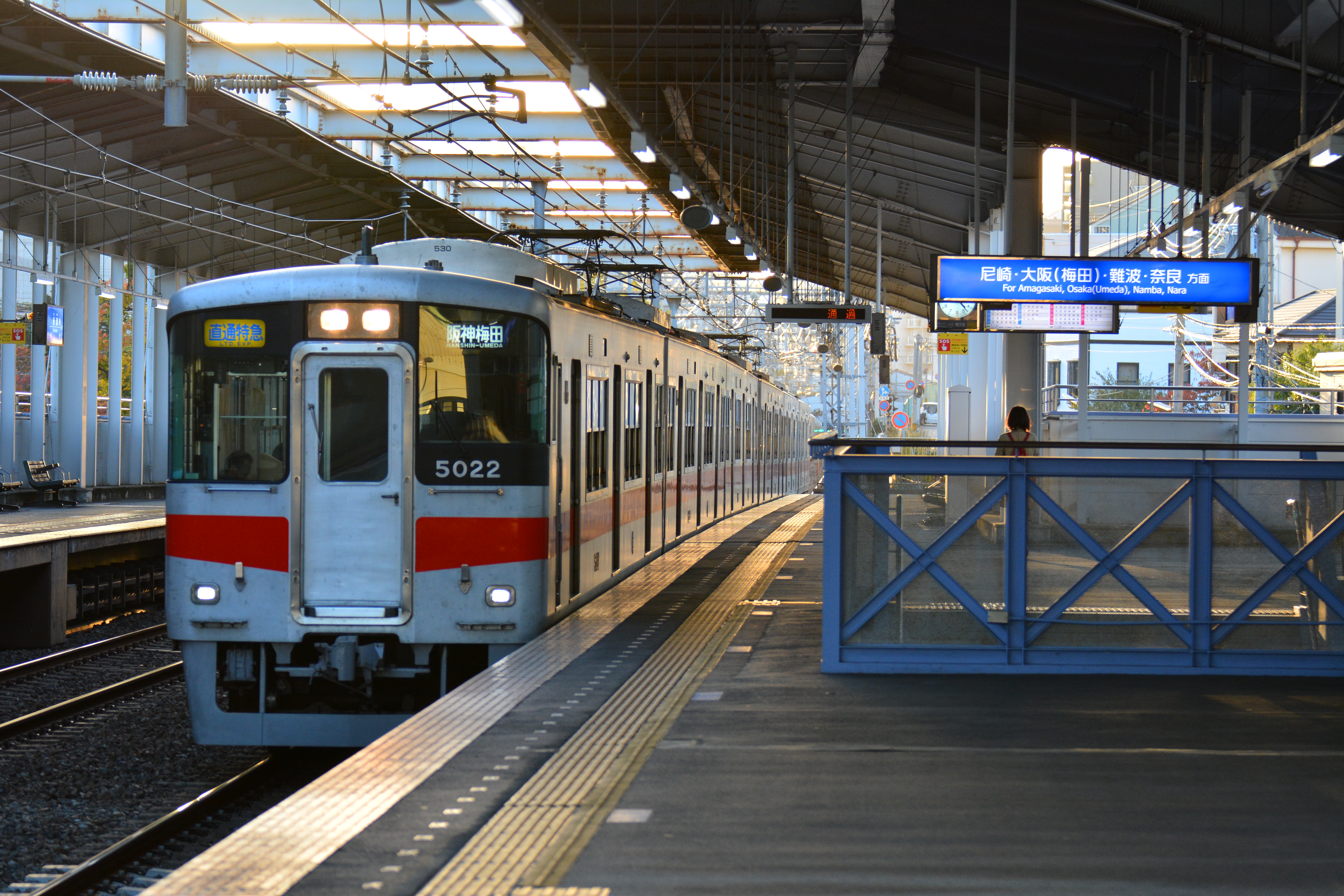 山陽電車5000系5022F